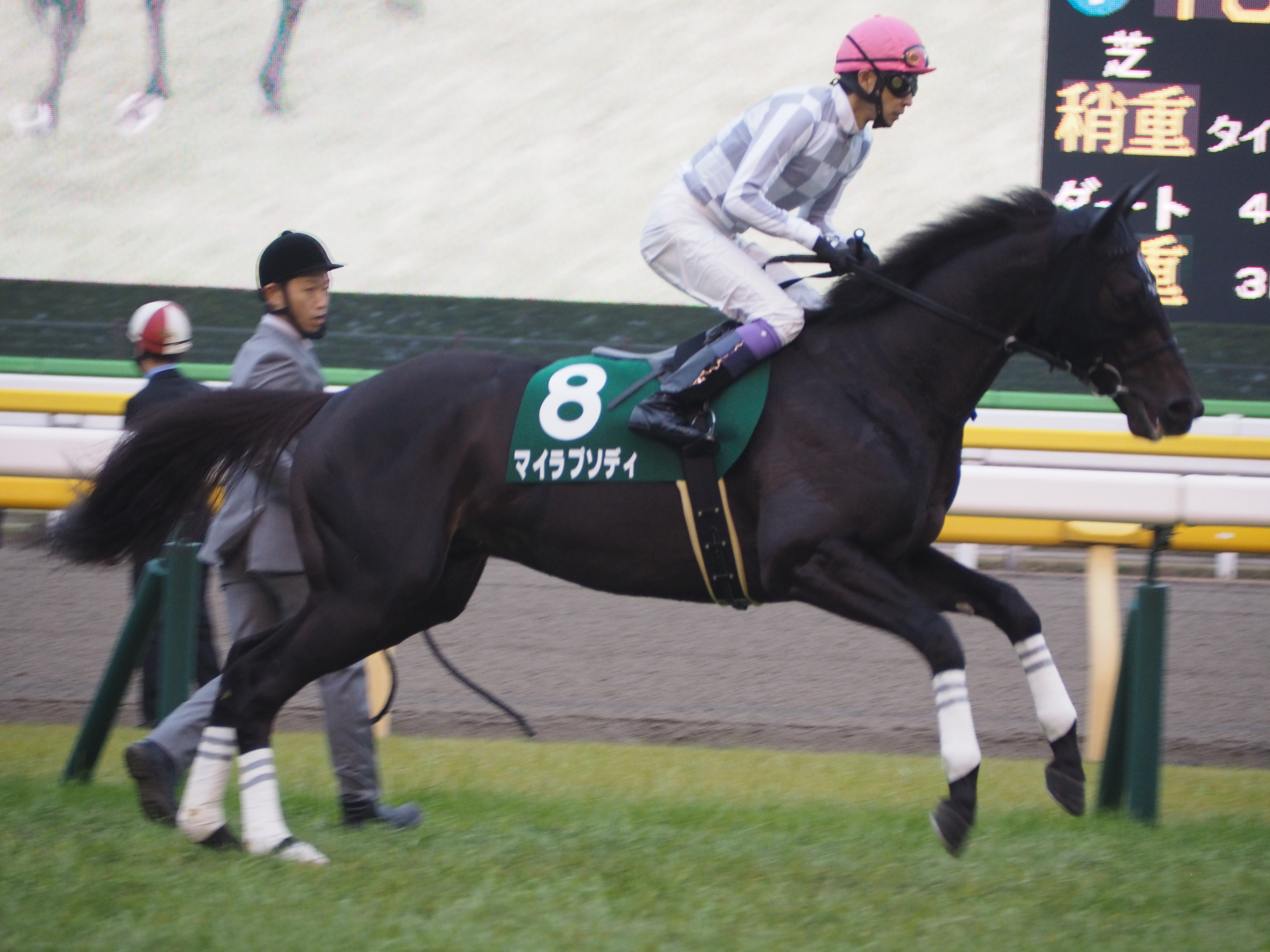 共同通信杯の本馬場入場をするマイラプソディ